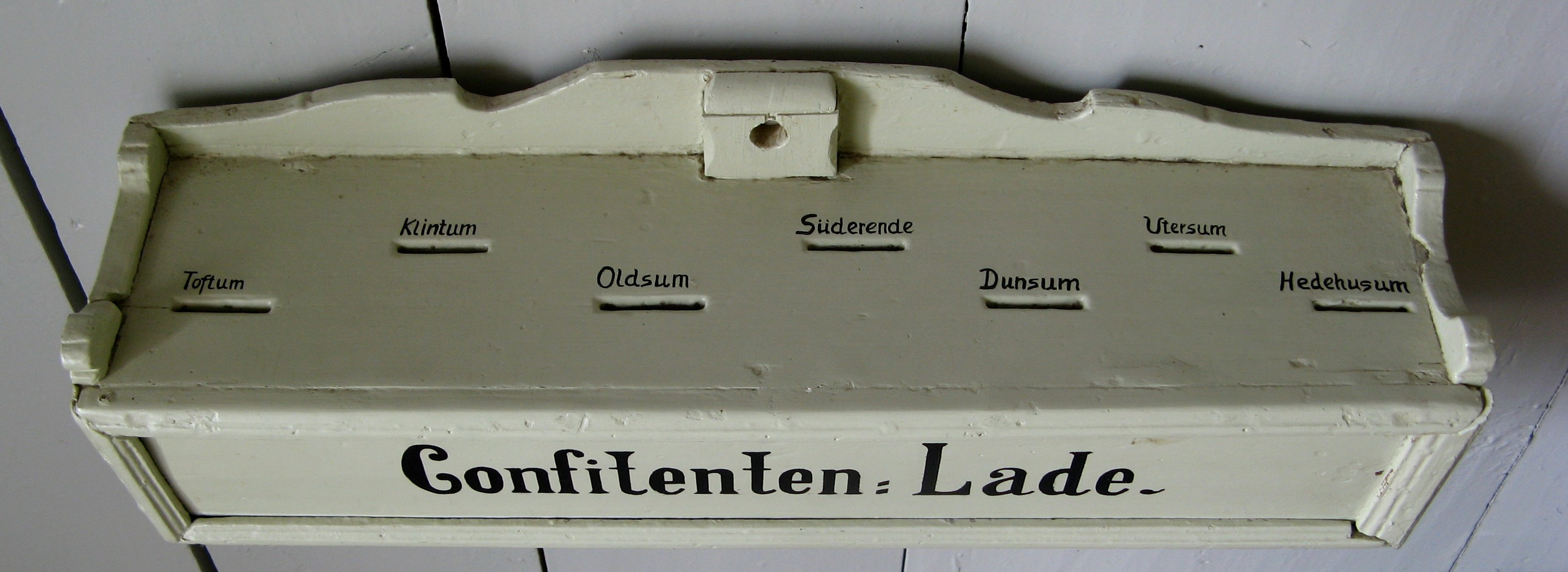 Confitentenlade